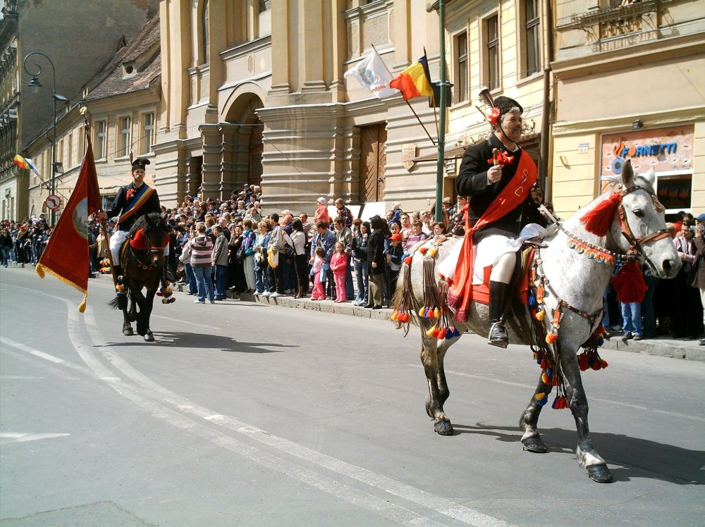 Junii Curcani - vătaful şi stegarul